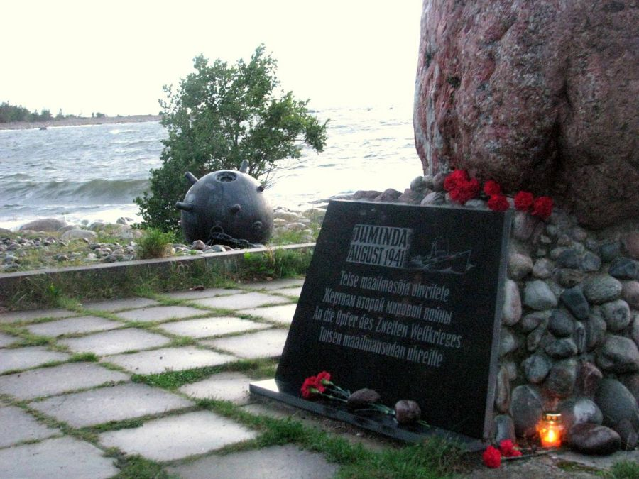 Мемориал погибшим в Таллинском переходе 1941 г. на мысе Юминда